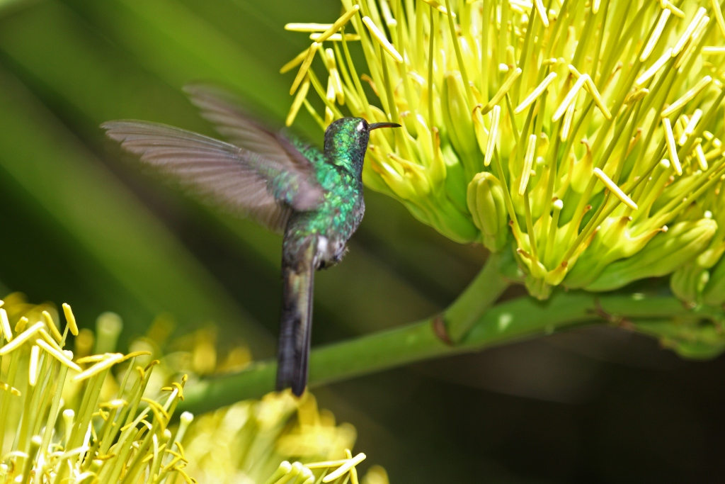 Playa Maguana, Guantanamo.